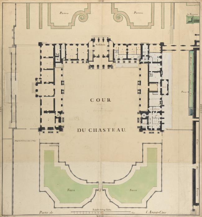 Plan du rez-de-chaussée du Château-Vieux de Meudon, vers 1700. BNF.